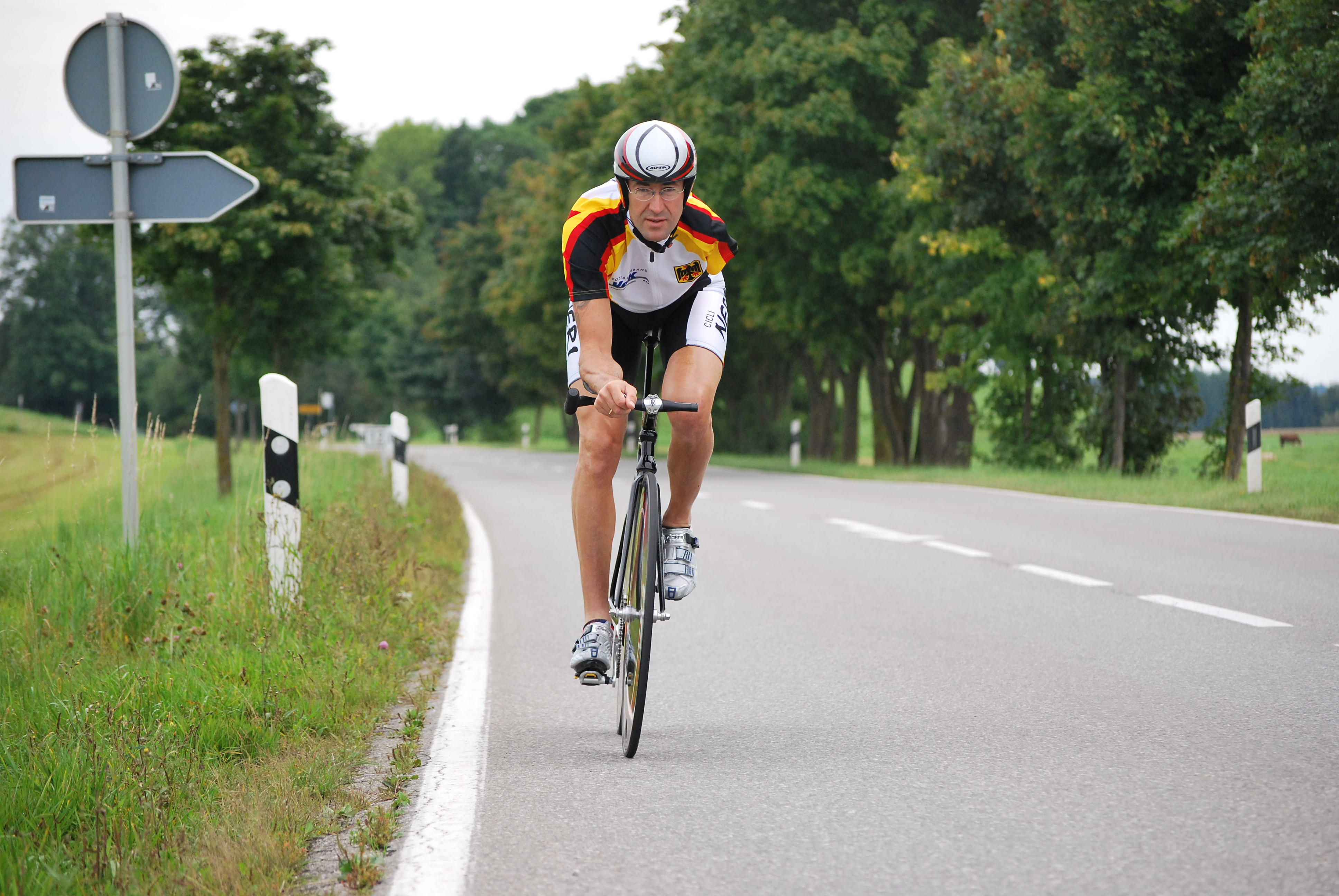 Paralympics-Sieger Wolfgang Sacher